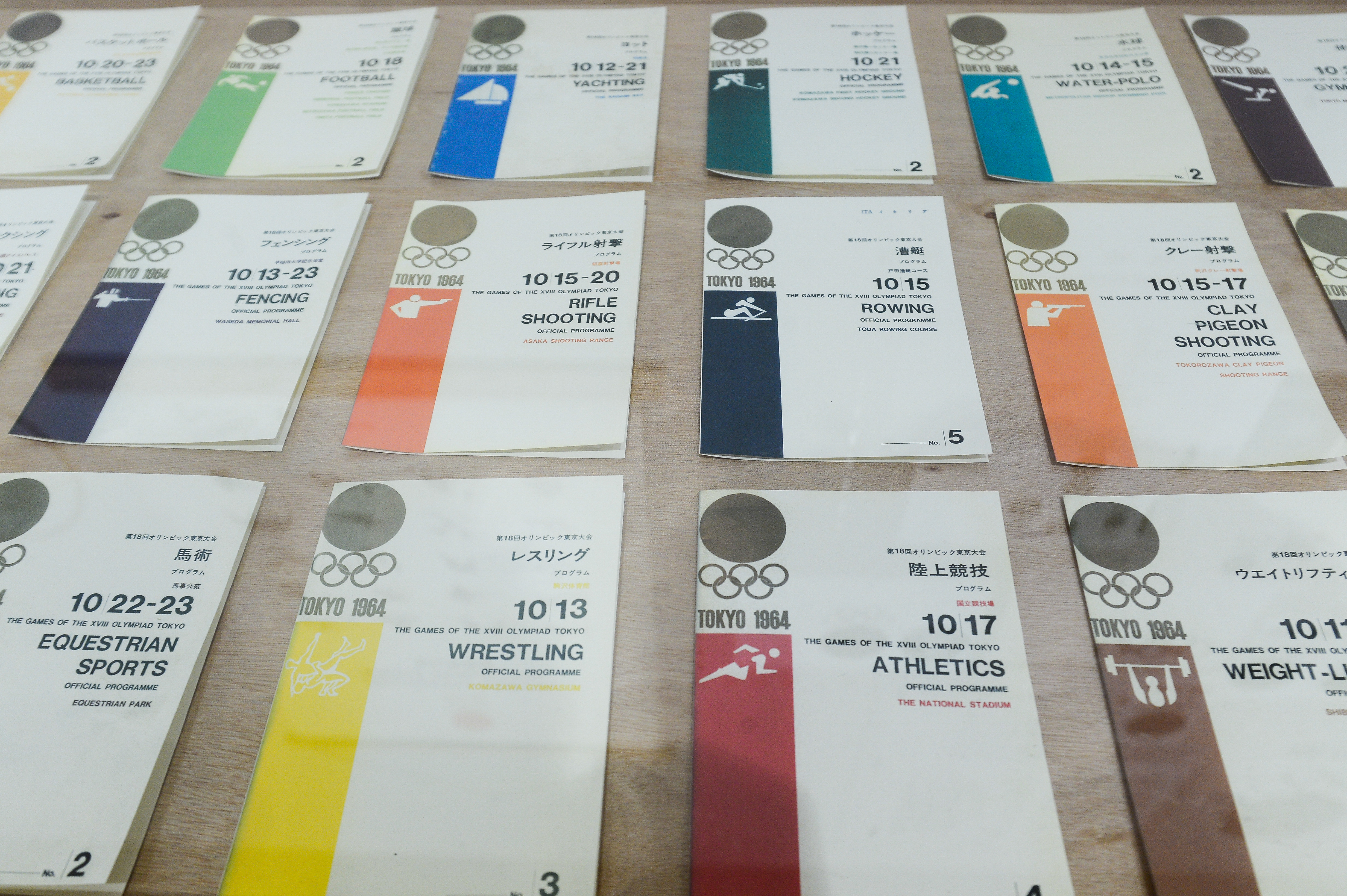 Rio de Janeiro - Exposição Design & Utopia dos Jogos, no Centro de Referência do Artesanato Brasileiro, apresenta peças de comunicação dos Jogos Olímpicos de Tókio, México, Munique, Los Angeles e Barcelona (Tomaz Silva/Agência Brasil)